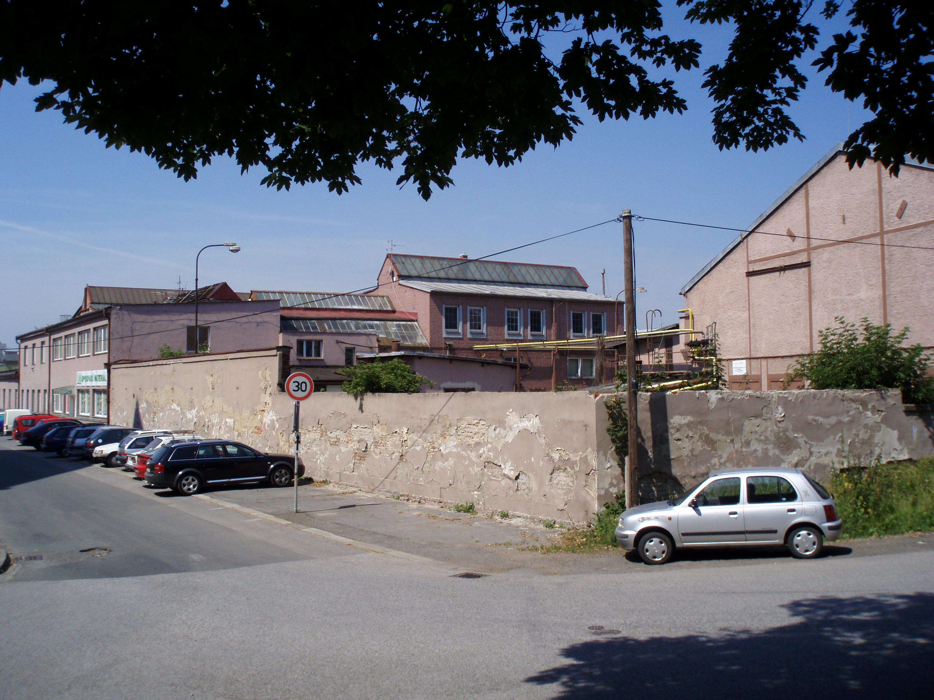 Bývalá Ippenova mostárna v Hradci Králové